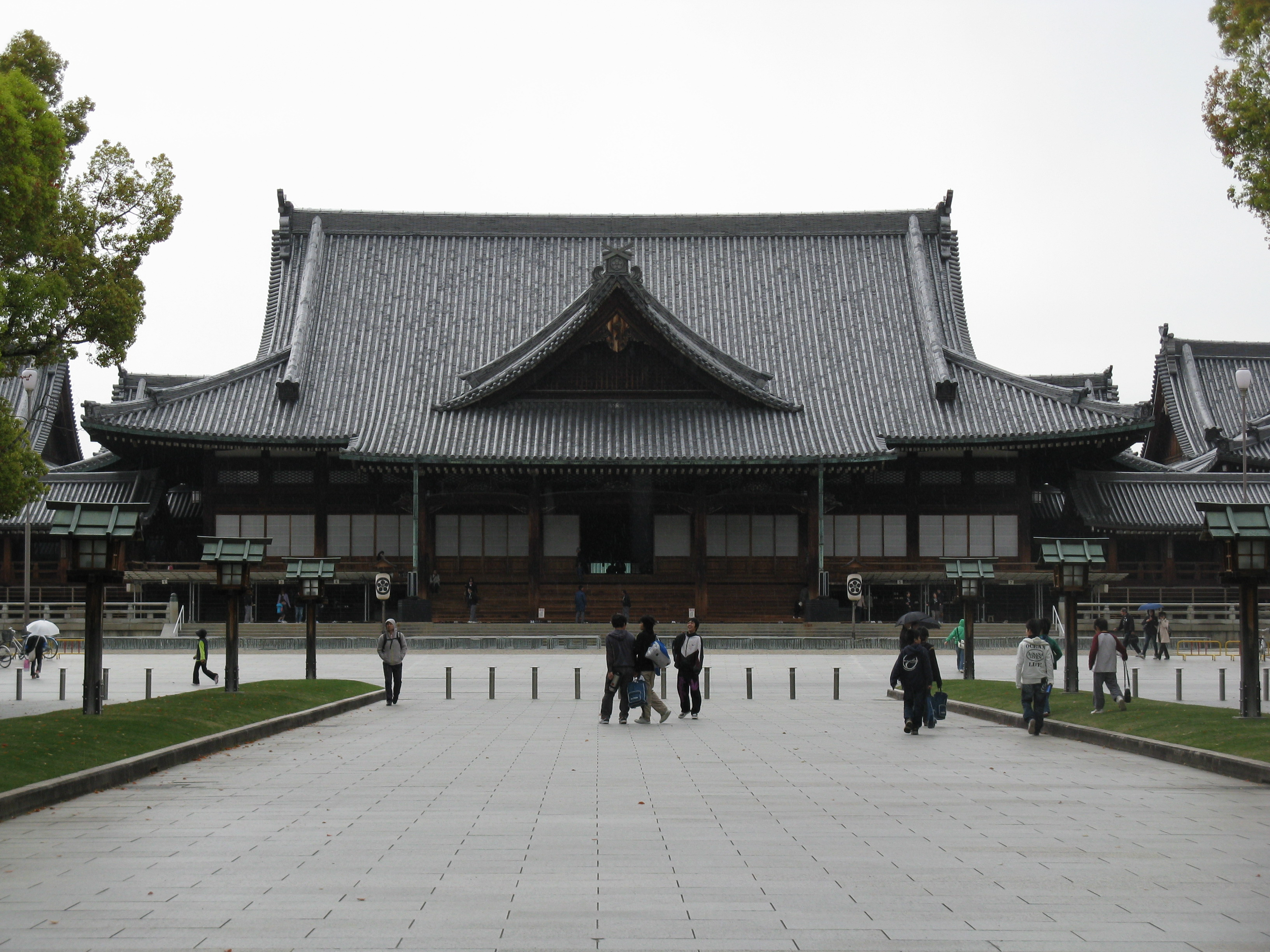 天理教教会本部 南礼拝場